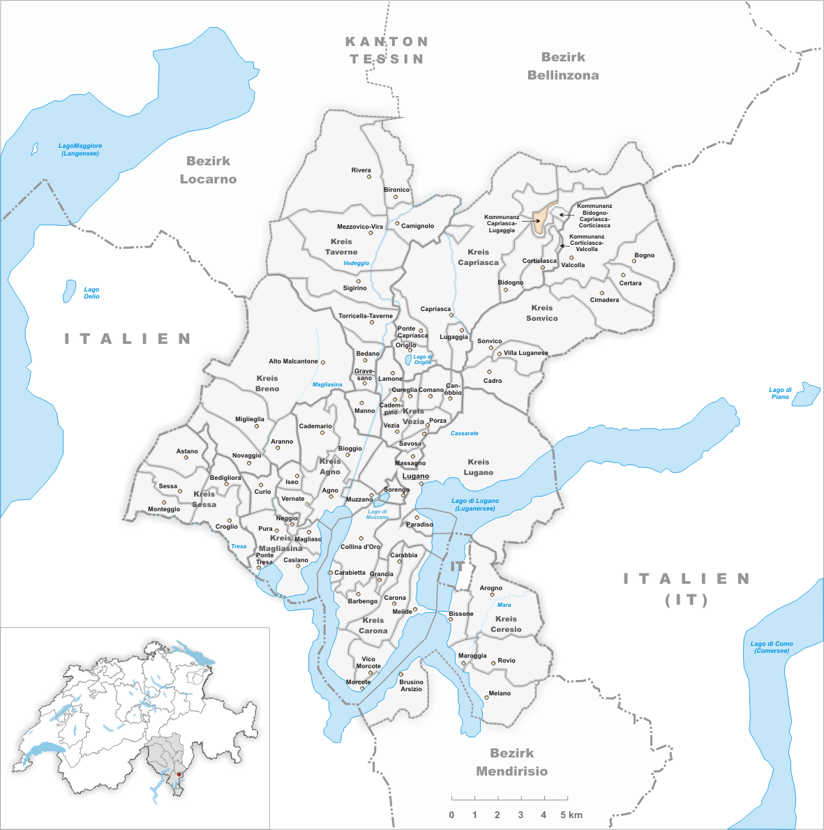 Kommunanz Capriasca-Lugaggia Artist: Tschubby